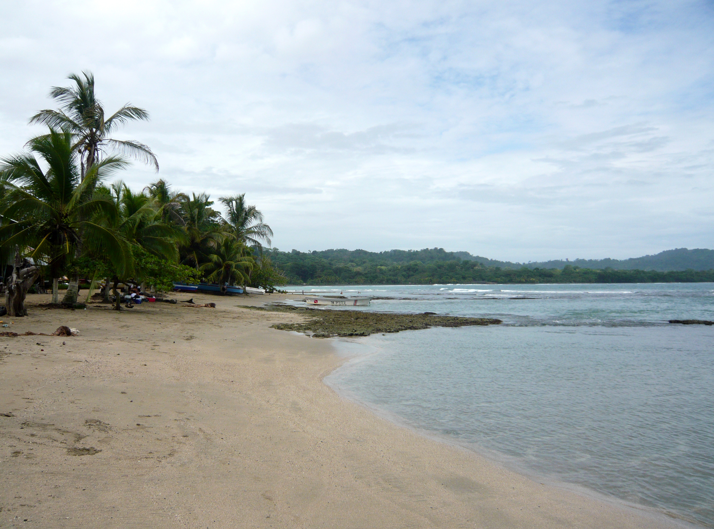 Puerto Viejo de Talamanca i Costa Rica